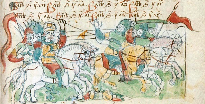 Похід князя Ігора на Печенігів у Радзивіллівському літописі